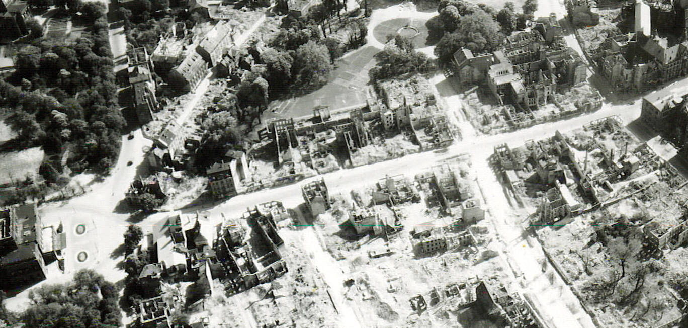 Luftbild des Steinwegs in Braunschweig im Mai 1945.